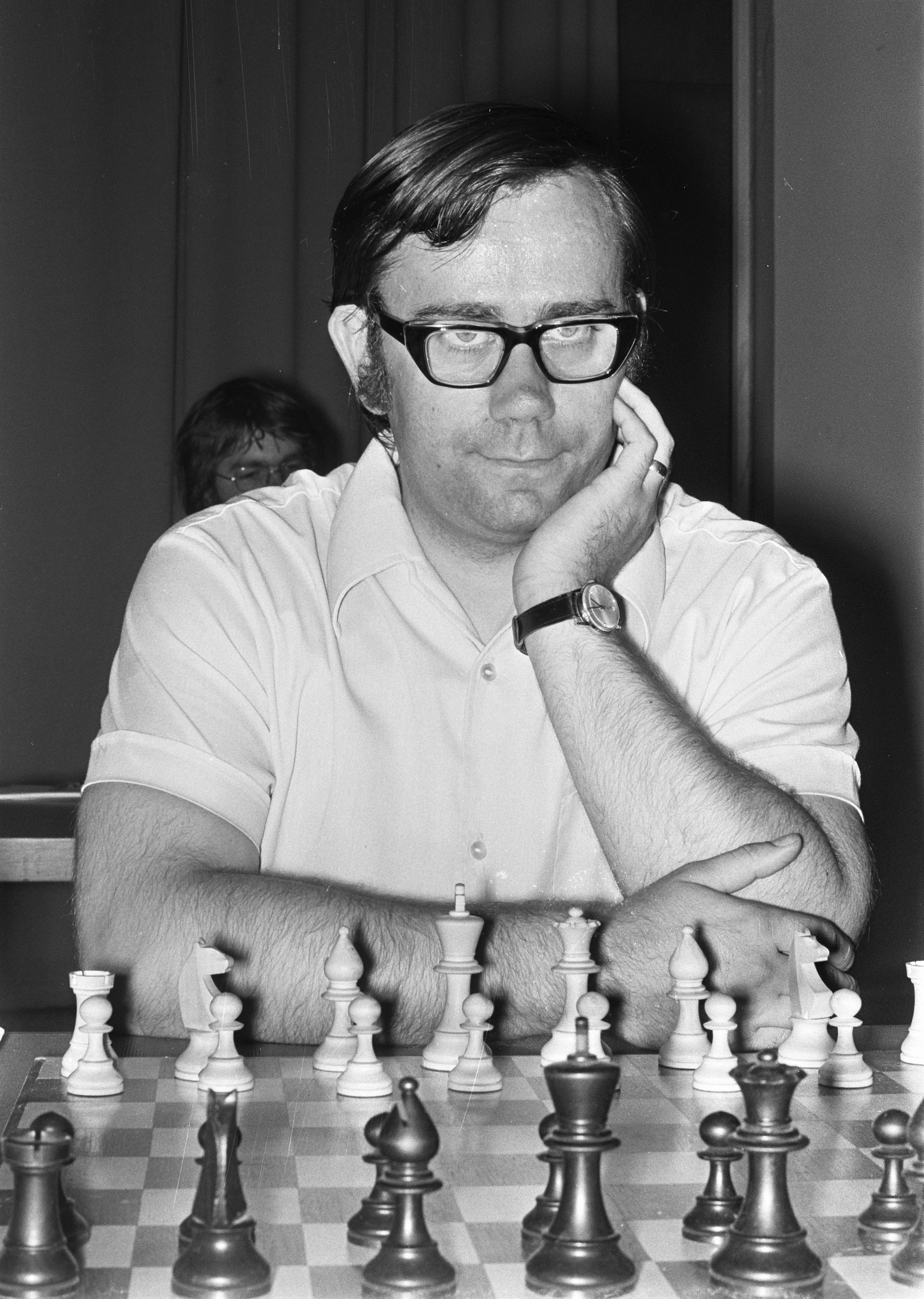 Collectie / Archief : Fotocollectie Anefo Reportage / Serie : IBM schaaktoernooi 1975 te Amsterdam Beschrijving : Jan Smejkal (Tsjech) Annotatie : Randnummer negatiefstrook: nr 13 Timman (Ned); nr 16 Gheorgia (Roem) Datum : 8 juli 1975 Locatie : Amsterdam, Noord-Holland Trefwoorden : portretten, schaken, toernooien Persoonsnaam : Smejkal, Jan Instellingsnaam : IBM-Schaaktoernooi Fotograaf : Fotograaf Onbekend / Anefo Auteursrechthebbende : Nationaal Archief Materiaalsoort : Negatief (zwart/wit) Nummer archiefinventaris : bekijk toegang 2.24.01.05 Bestanddeelnummer : 928-0394